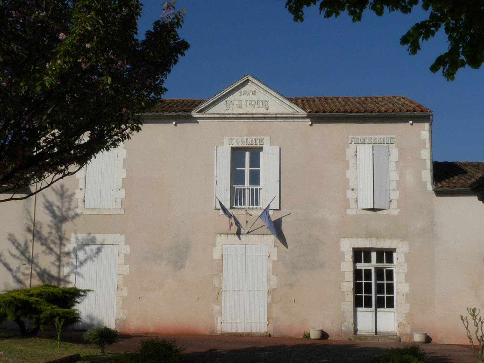 mairie de Genac, Charente, France